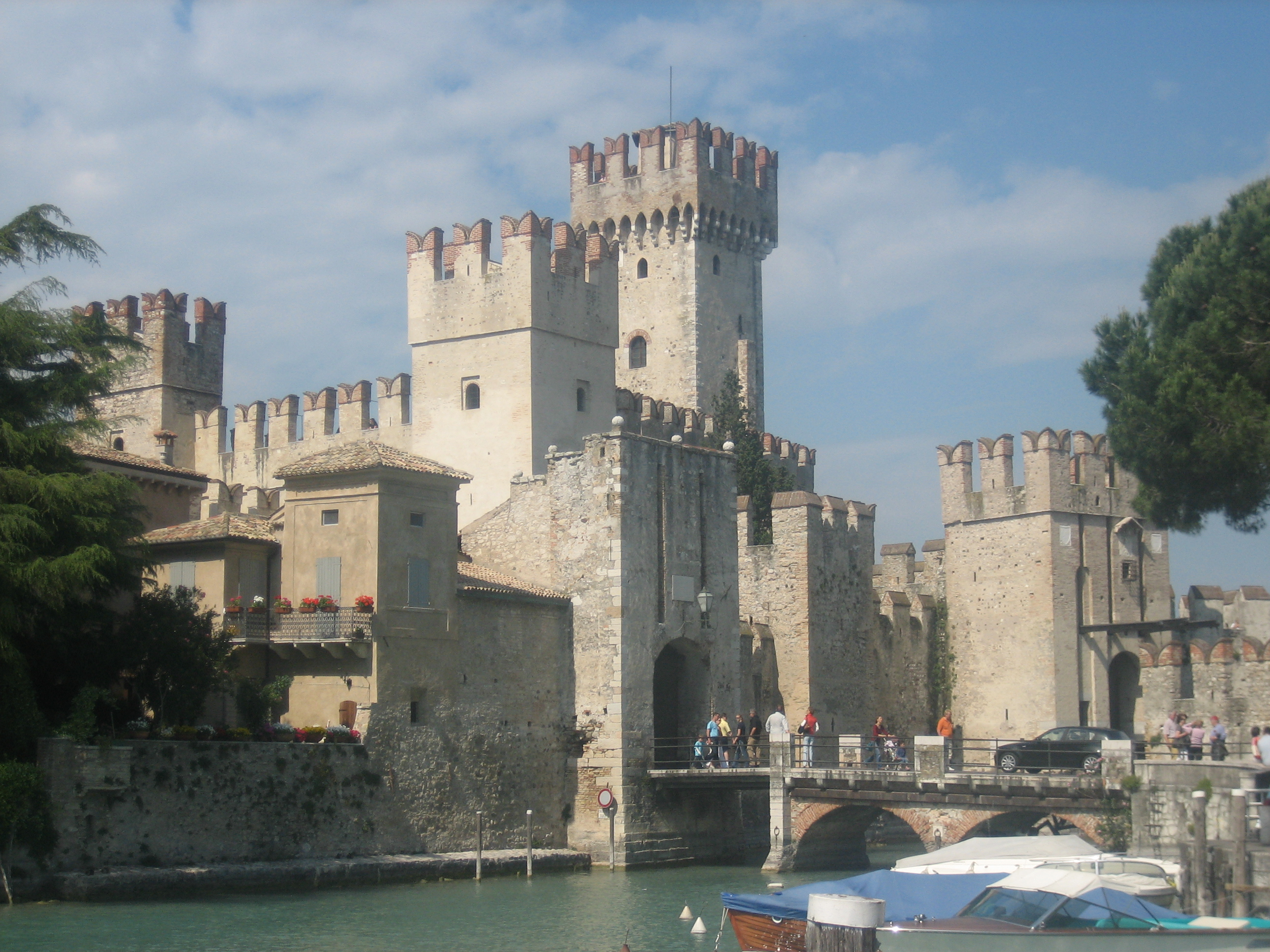 Schloss in Sirmione